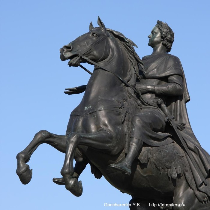 Медный всадник